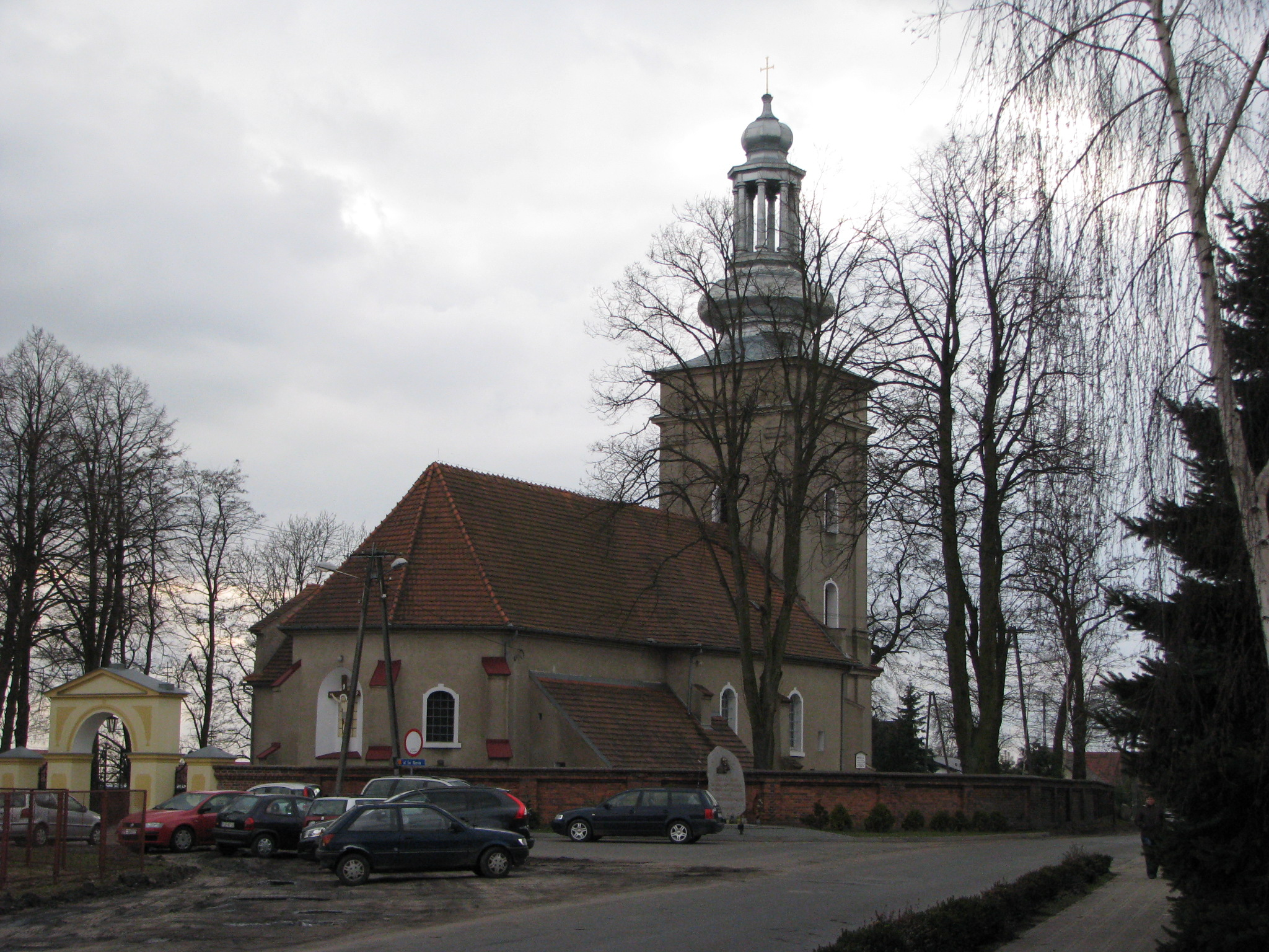 Kościół parafialny pw. św. Marcina w Wilkowicach (pow. leszczyński)